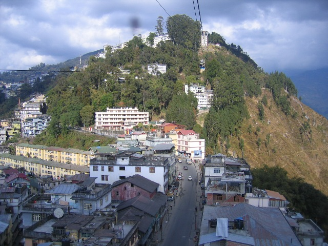 Столица Сиккима